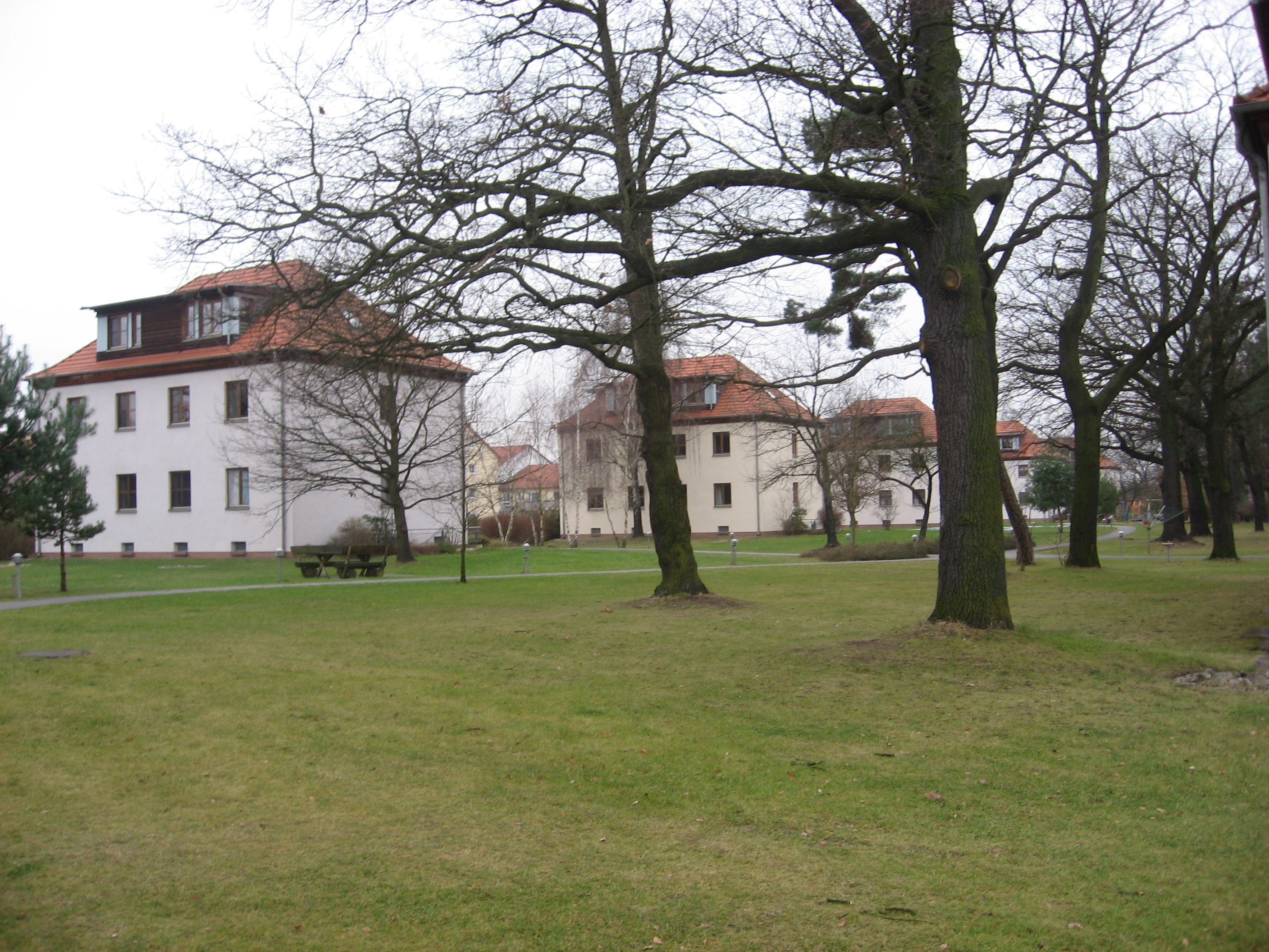 Studentenwohnung auf dem Campus des Theologischen Seminars Elstal